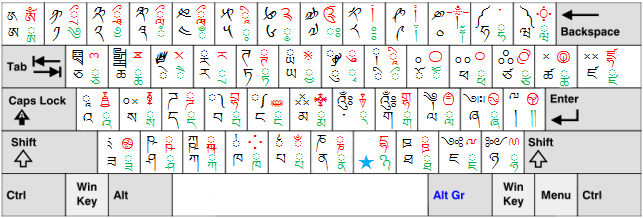 Windowsのチベット語キーボード